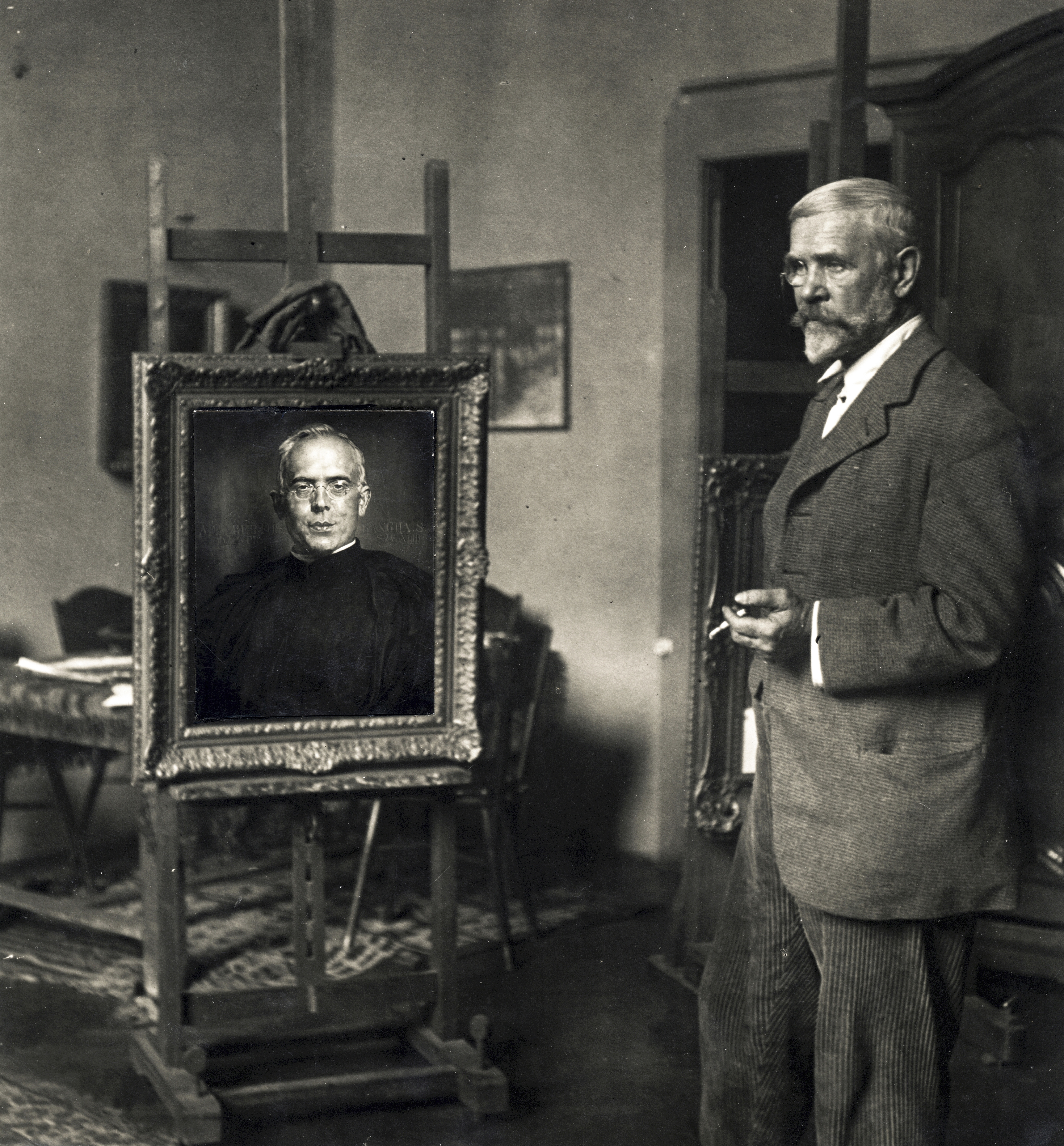 Karlovszky Bertalan (1858–1938) festőművész műtermében. Location: Hungary Title: Karlovszky Bertalan festőművész műtermében.